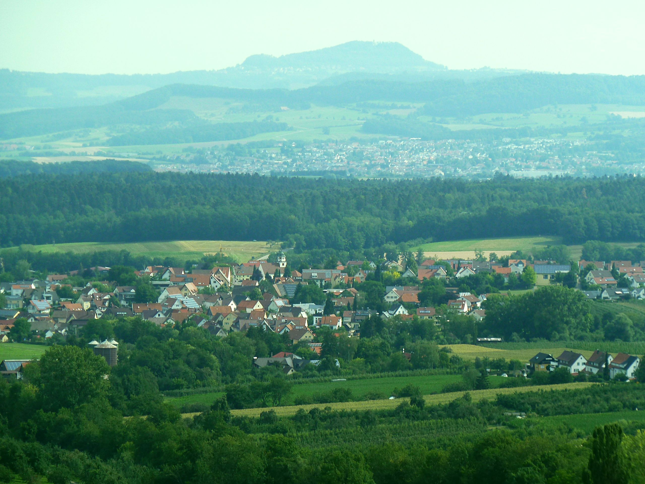 Blick auf Schlat, im Hintergrund Salach, ganz hinten (der) Rechberg